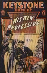 Poster de la película His New Profession de Charles Chaplin.